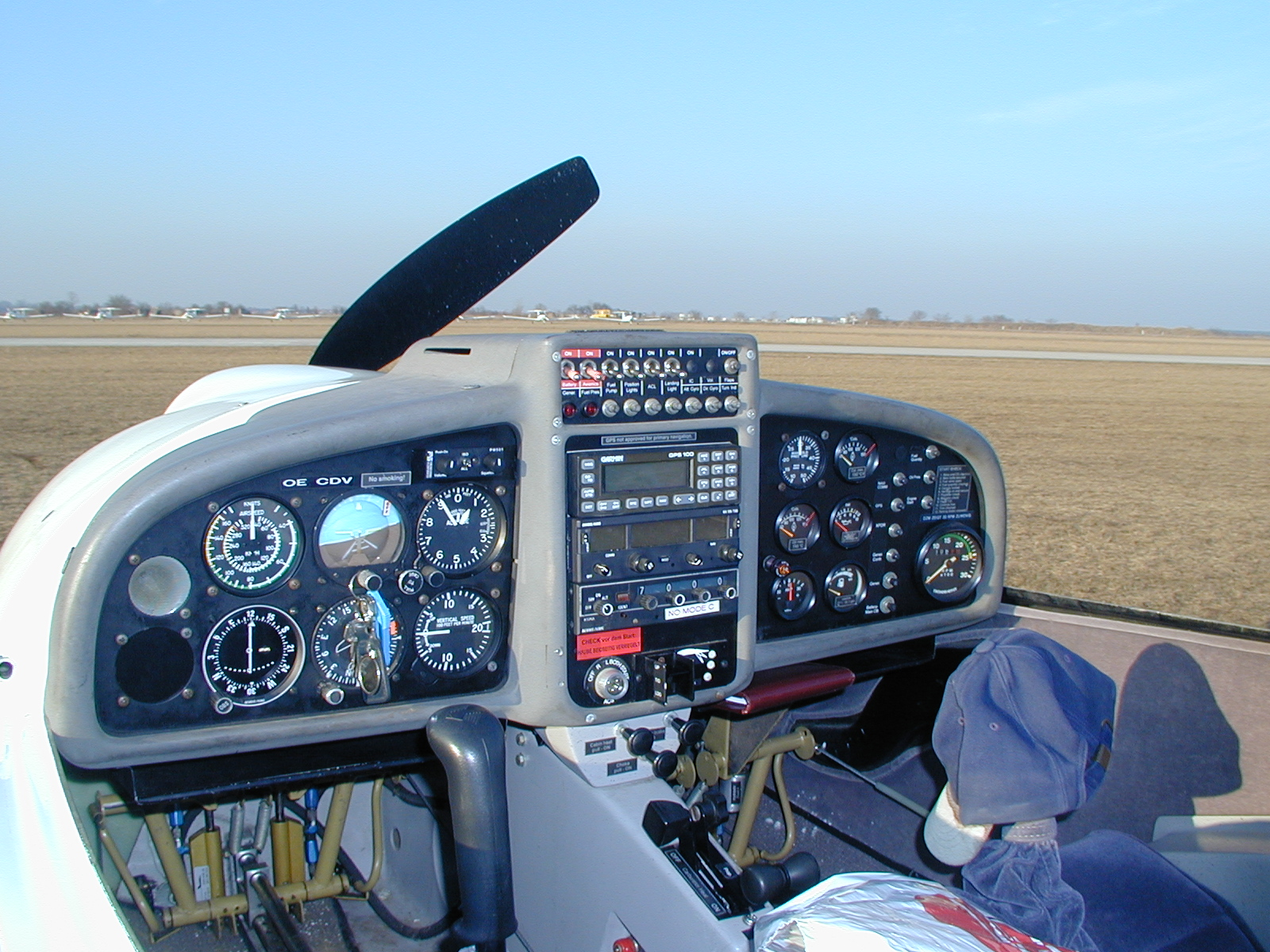 Cockpit Diamond DV 20, Flugplatz LOAN